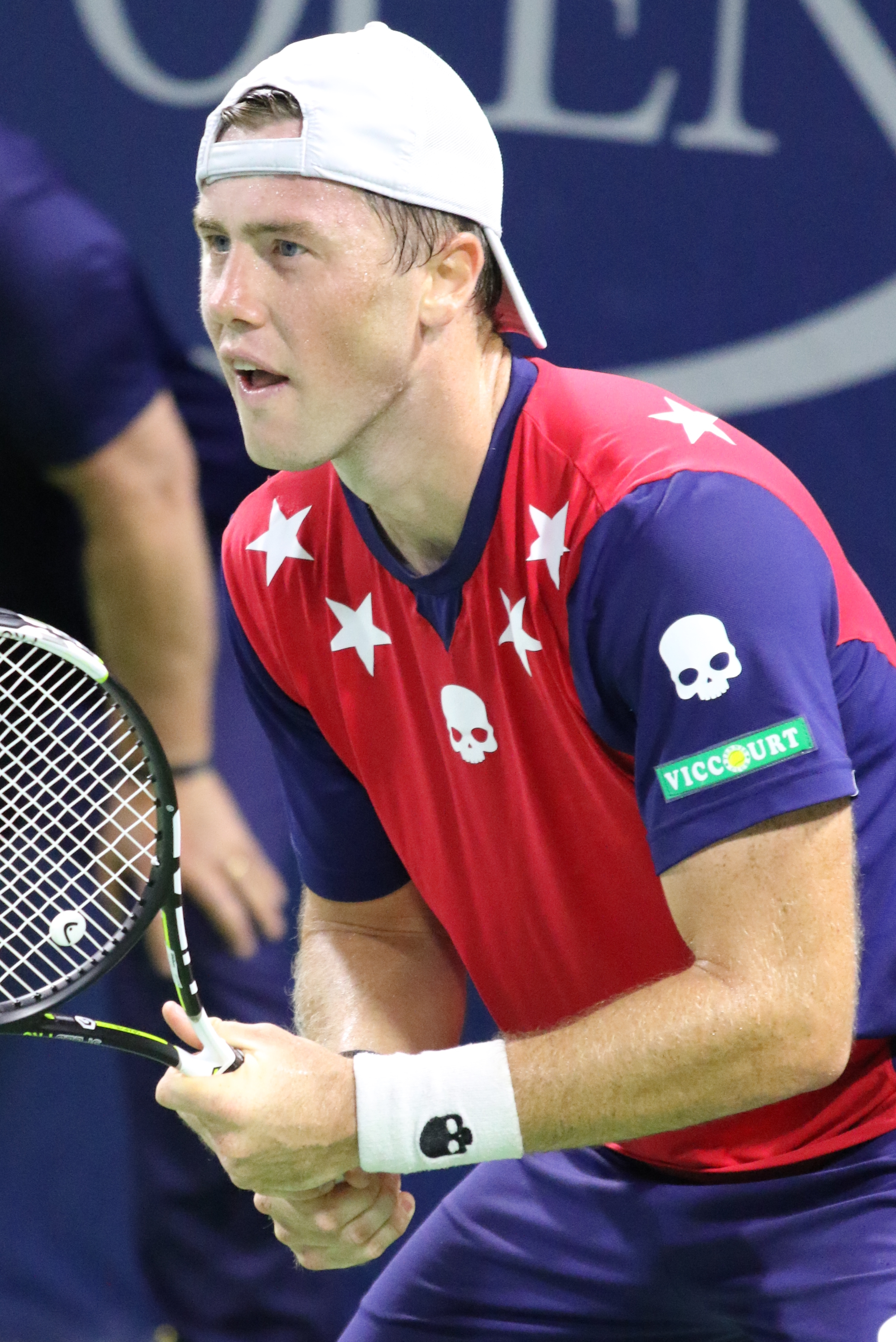 Marchenko US16 (9)